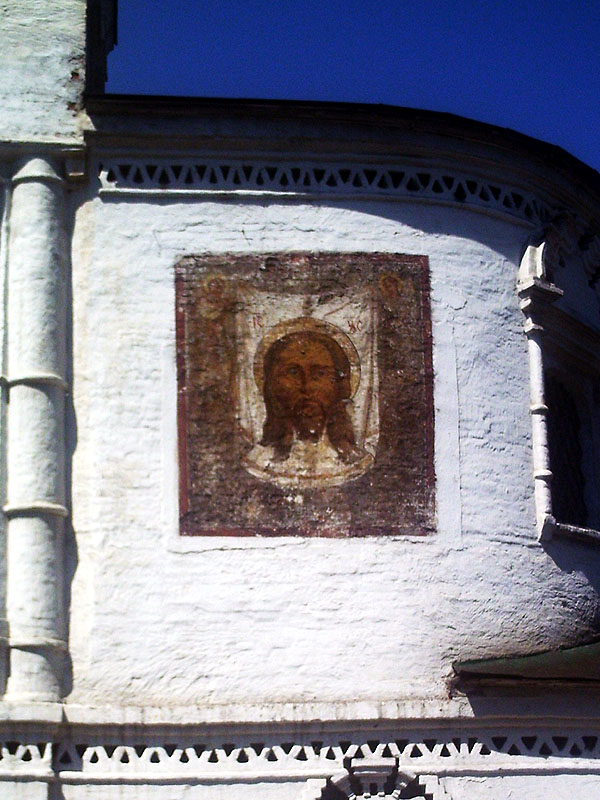 Лик Спаса Нерукотворного на апсиде Спасской церкви в Иркутске